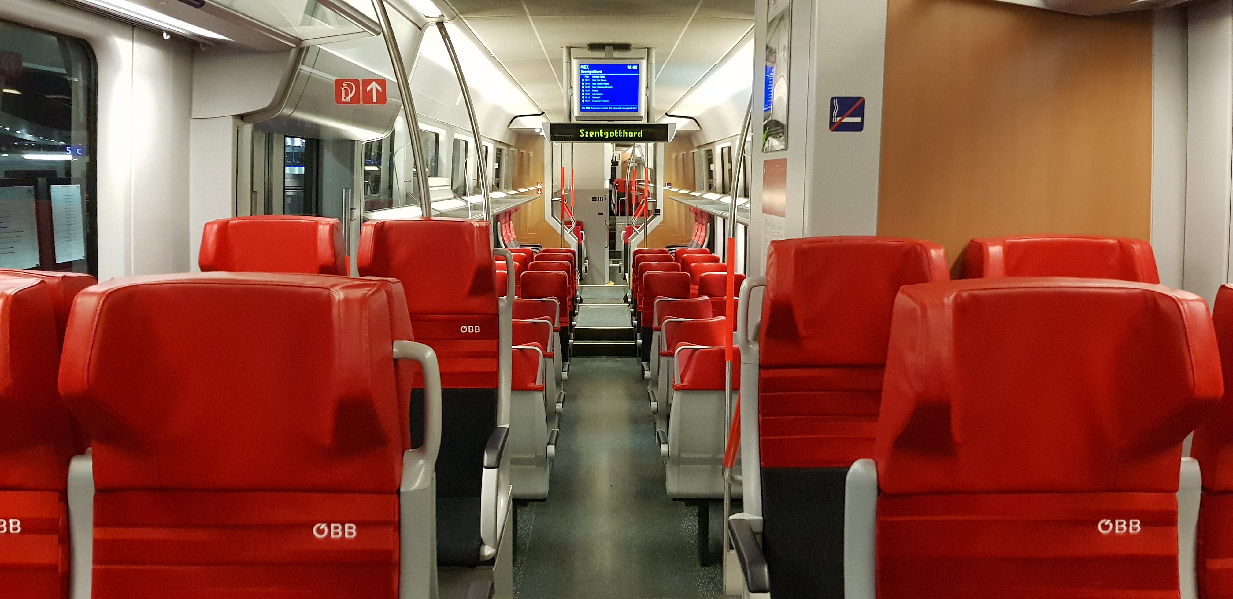 Fahrgastraum des ÖBB 5022 001-9